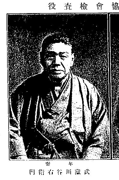 剣山 （年寄武蔵川時代）